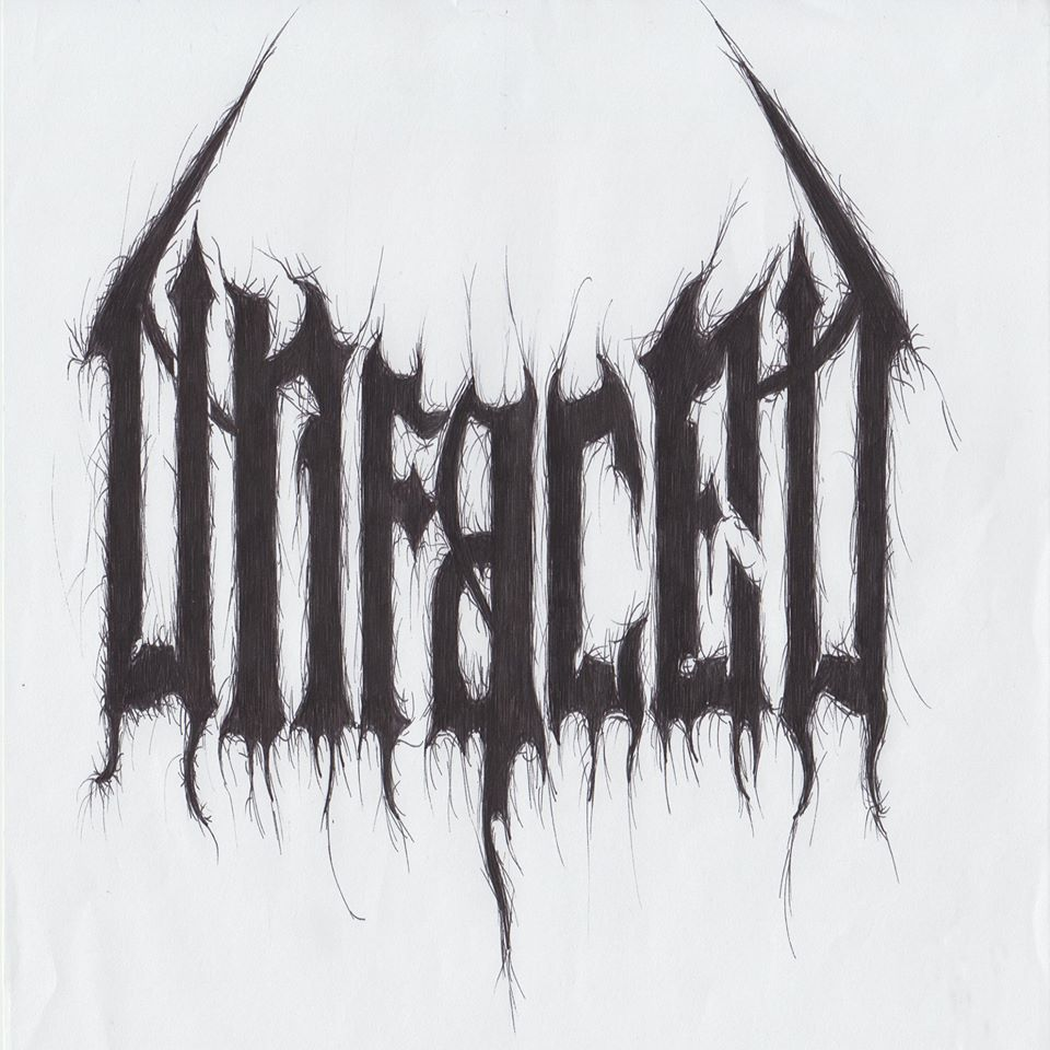 Logo zespołu UnFaced